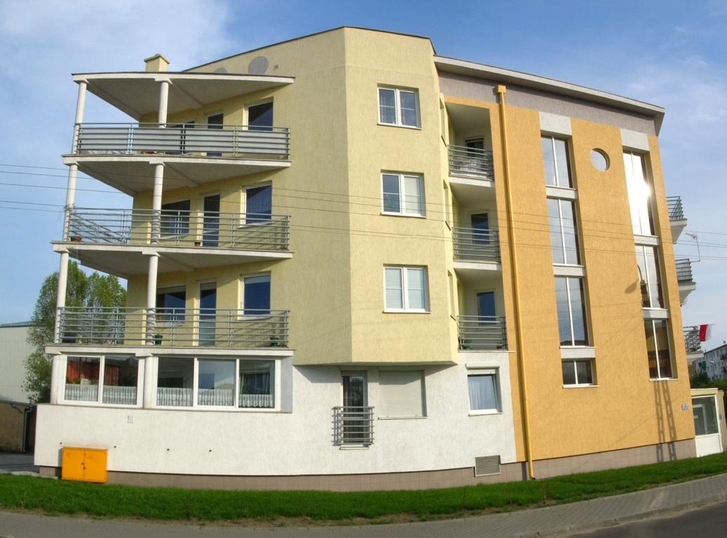 Nowa zabudowa na osiedlu Błonie w Bydgoszczy - ul. Stawowa